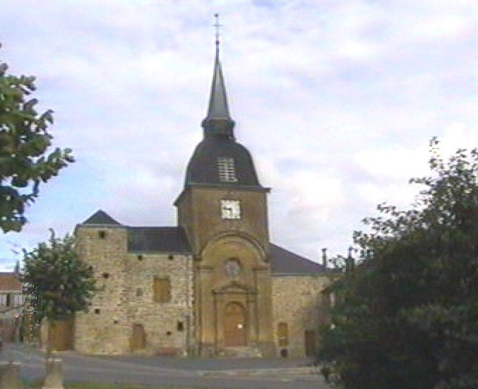 Village de Saint-Menges (08), l'église Saint-Memmie Photo (médiocre) prise le 13 septembre 2004 par F5ZV 17 sep 2004 à 19:59 (CEST) Copyright : licence GFDL F5ZV 13 septembre 2004